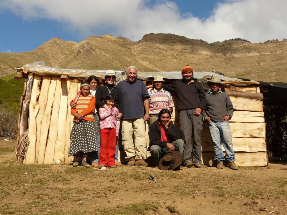 pablo en lengas de trapa